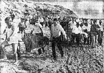 פינוי גופות הנספות מחוף תל אביב